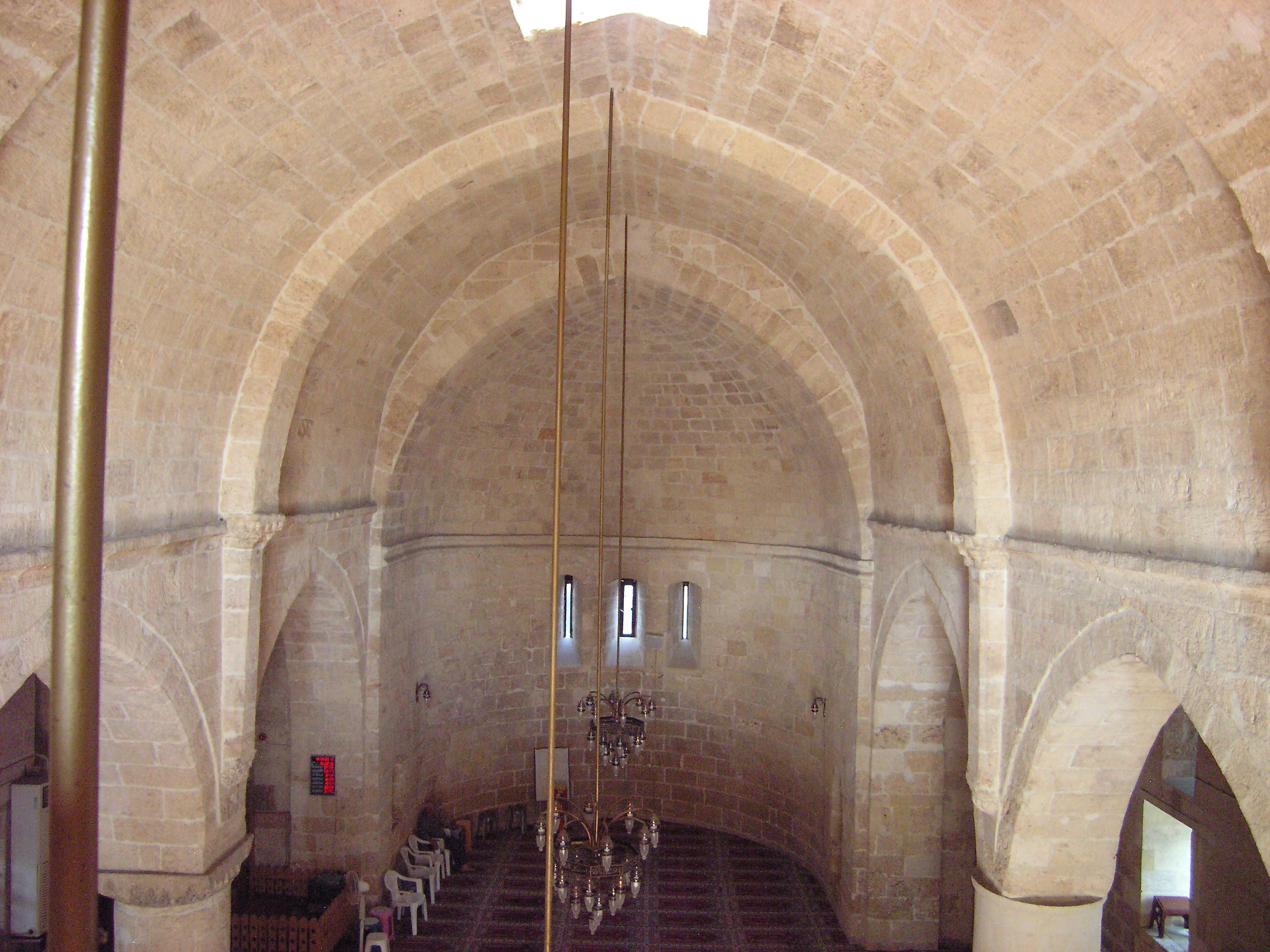 Alte Moschee in Tarsus - als Kirche erbaut und 1415 zur Moschee umgebaut. Blick nach Osten, Apsis der ehemaligen Kirche